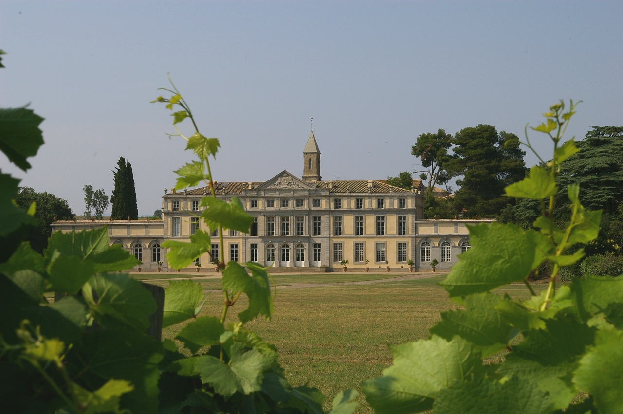 Château de Pennautier, Aude, France